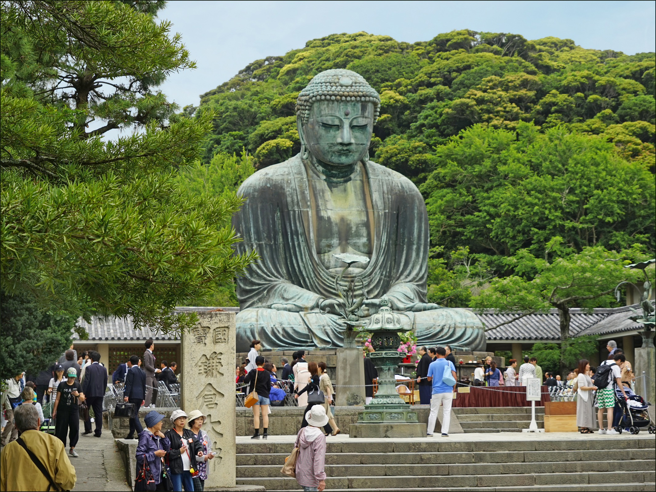 Préparation d'une cérémonie devant le Grand Bouddha Le Grand Bouddha de Kamakura est une statue monumentale en bronze d'Amitābha Bouddha située dans le temple de Kōtoku-in. La statue date probablement de 1252, de l'époque de Kamakura, d'après les registres du temple. Article de Wikipedia sur le temple Le site officiel Le temple sur les guides du Japon